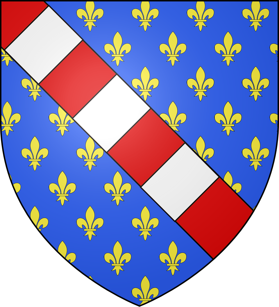 Blason du comté d'Evreux : d'azur semés de lys d'or à la bande componée d'argent et de gueules